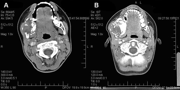 Fibrosarcoma della mandibola di un bambino rilevato mediante TC. L'immagine A, acquisita alla diagnosi, mostra una lesione osteolitica con rottura della corticale ossea, che appare dopo 4 mesi (immagine B) di dimensioni incrementate e con maggiori componenti sia iperdense che ipodense. Tratto da Gosau et al.2008 Fibrosarcoma of the childhood mandible Head & Face Medicine CC BY 2.0 License